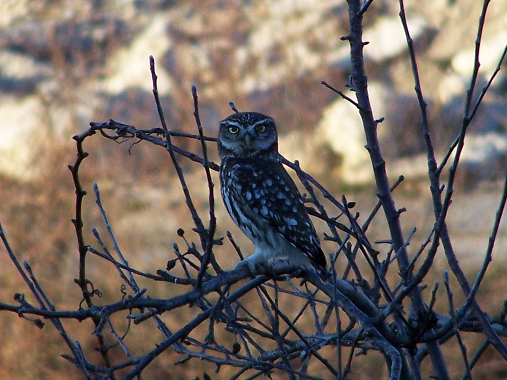 Mocho-galego (Athene noctua), Serra da Estrela (perto de Prados), Portugal